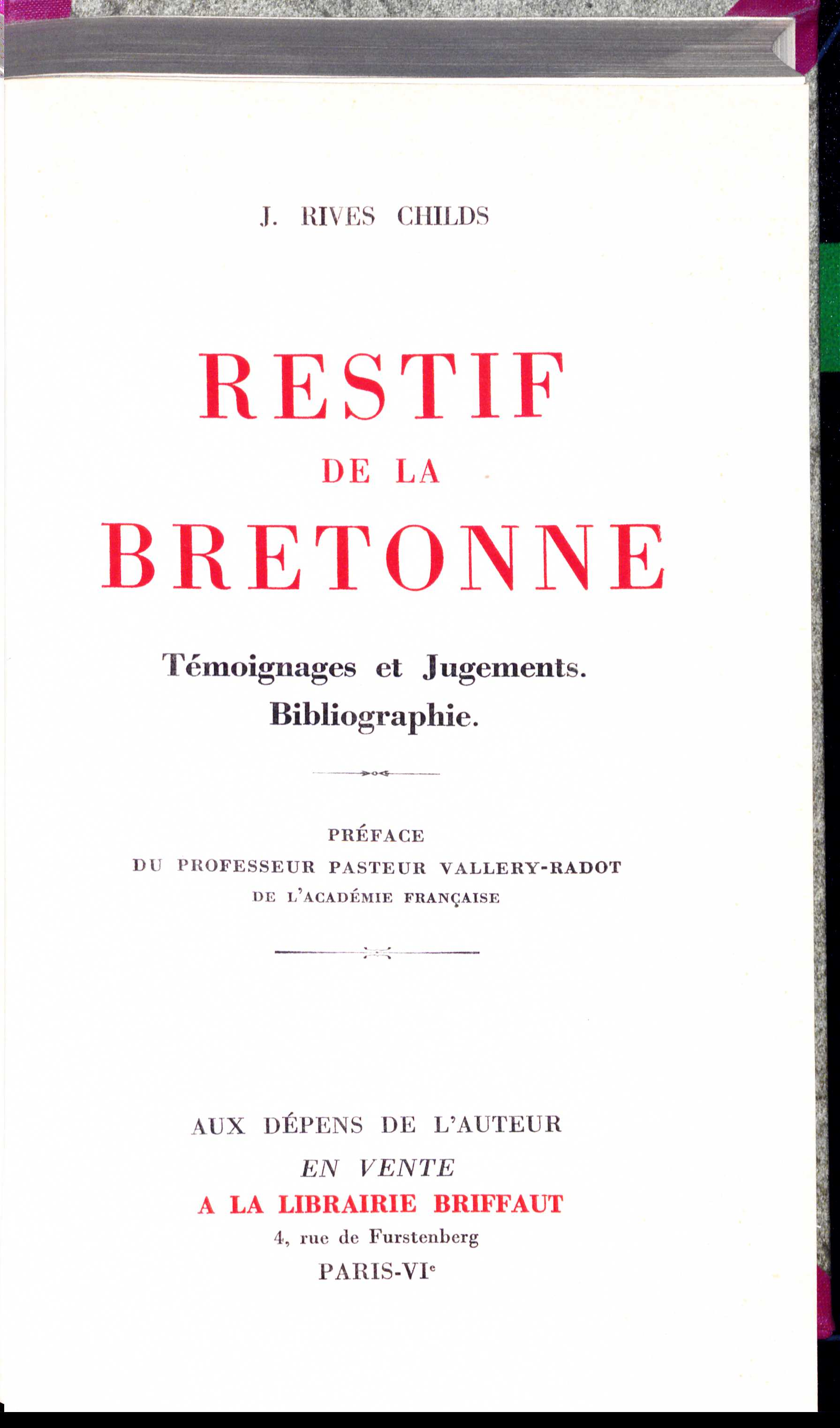 J. Rives Childs Restif de la Bretonne 1949 Title